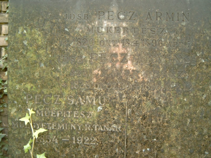 Pecz Samu sírja Budapesten. Kerepesi temető: B. 567.